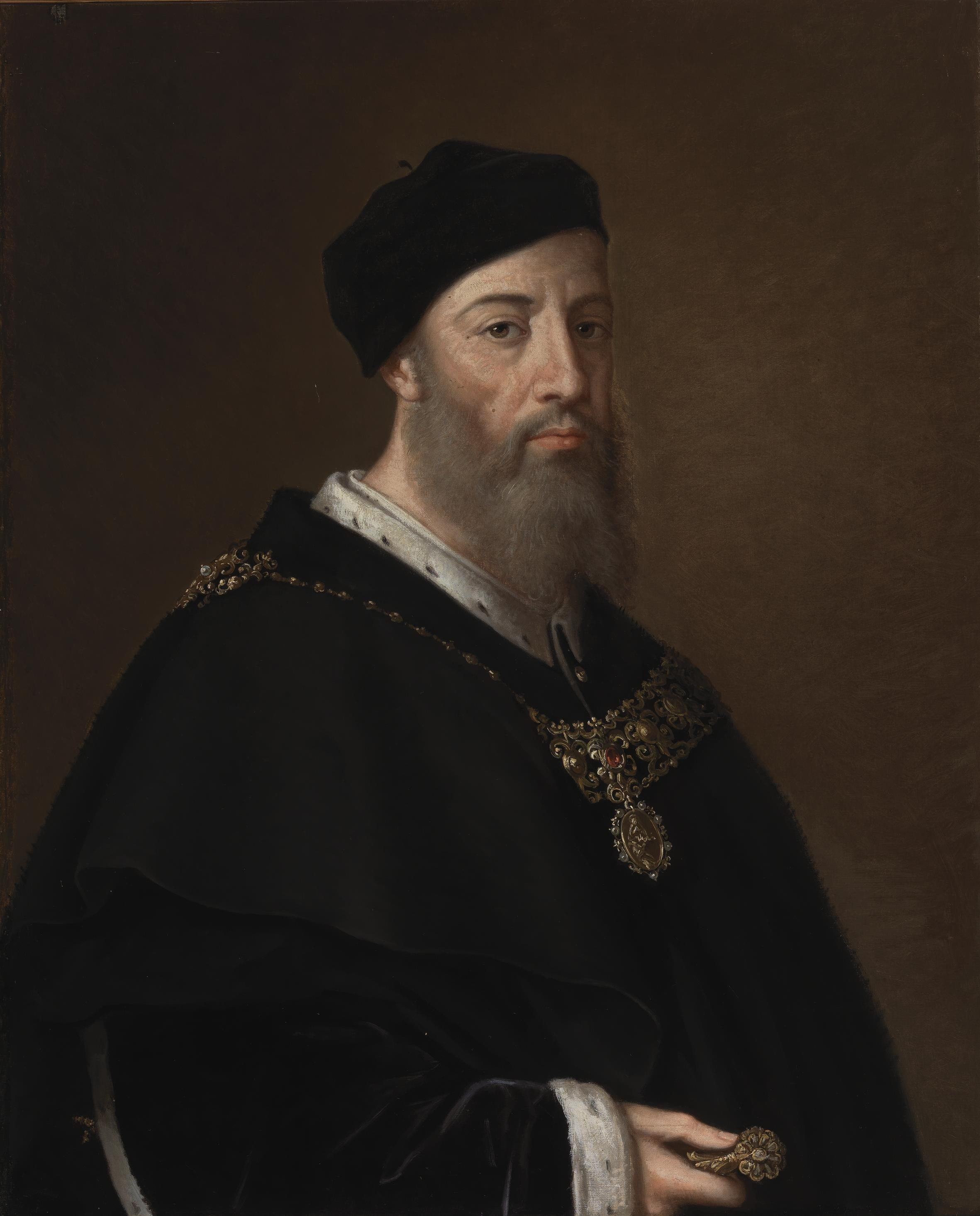 Retrato del aristócrata español Alonso Gurrea de Aragón (1487-1550), conde de Ribagorza, duque de Luna y bisnieto del rey Juan II de Aragón.